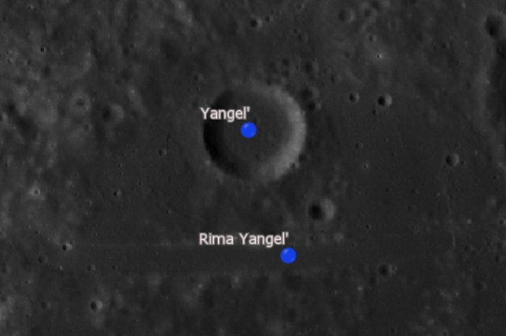 Cráter lunar Yangel'. (Imagen LRO)